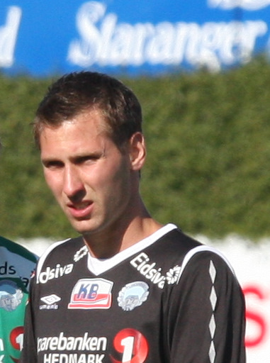 Johan Nilsson Guiomar at Bryne stadion